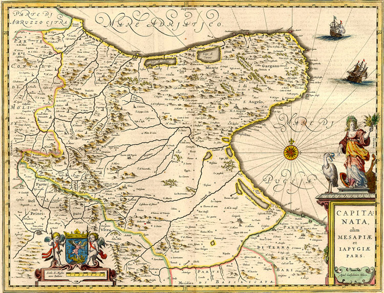 Carta della Capitanata, incisione acquerellata di W. e J. Blaeu, 1645 ca.